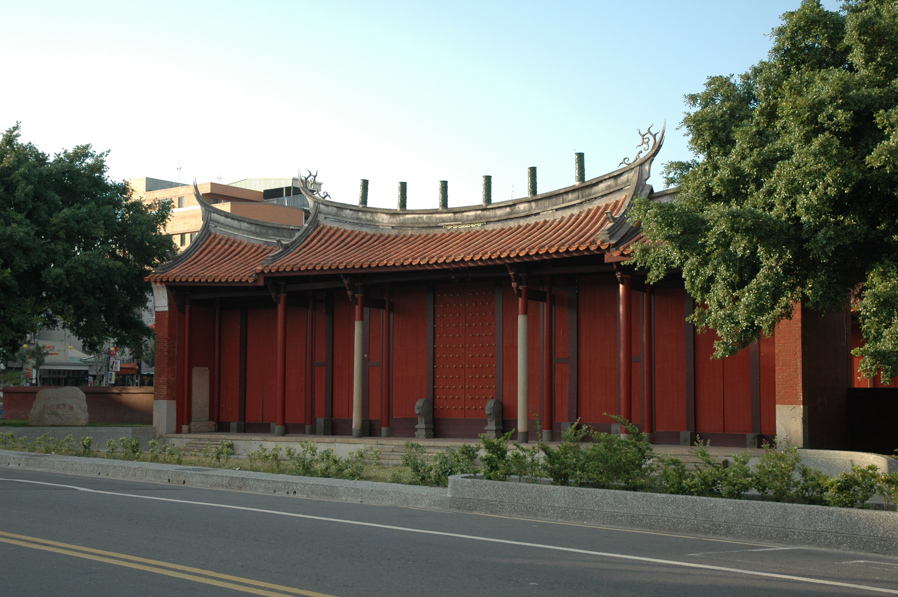 中文（台灣）: 彰化孔子廟41